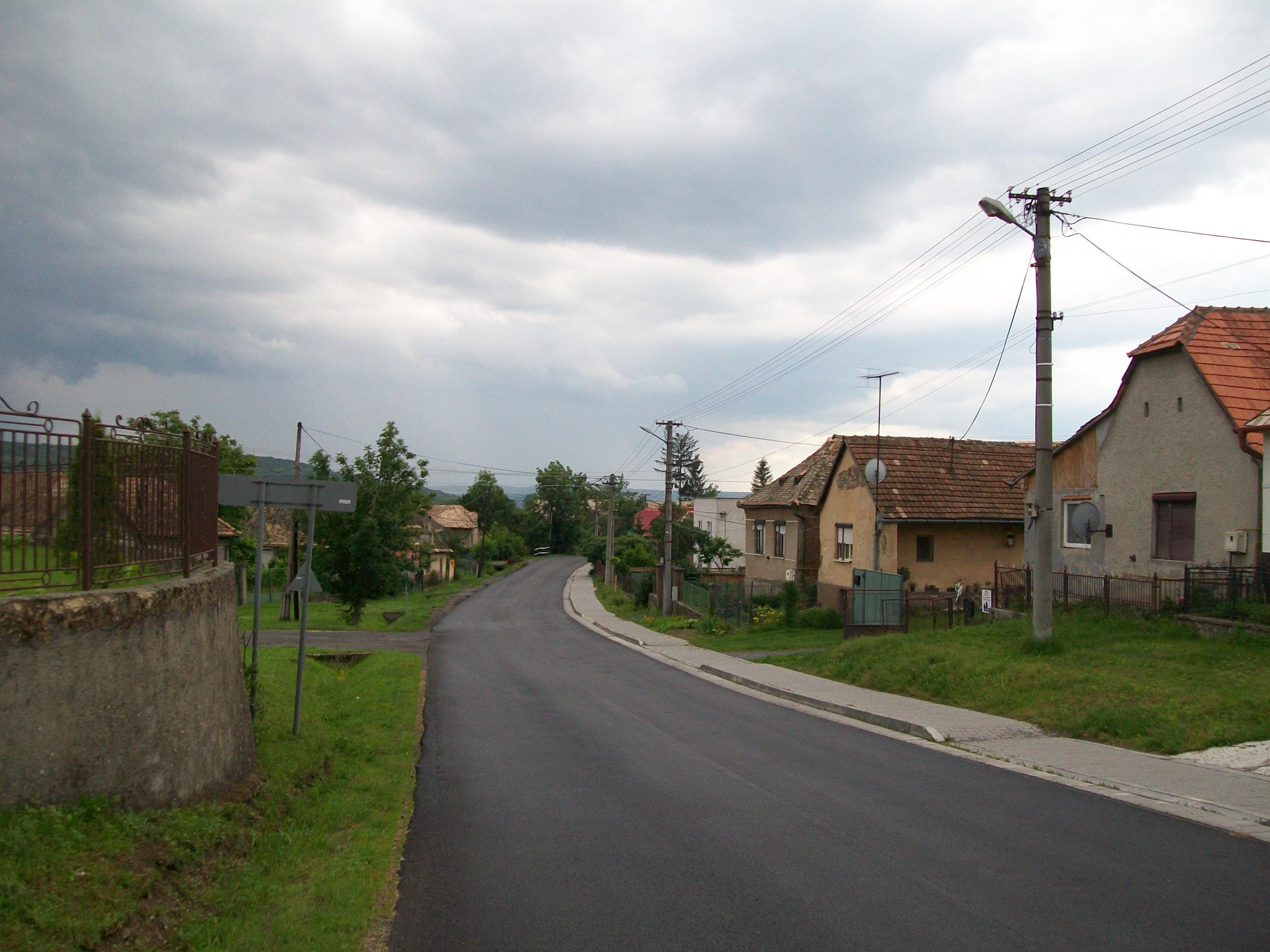 Ulica vo Veľkých Dravciach